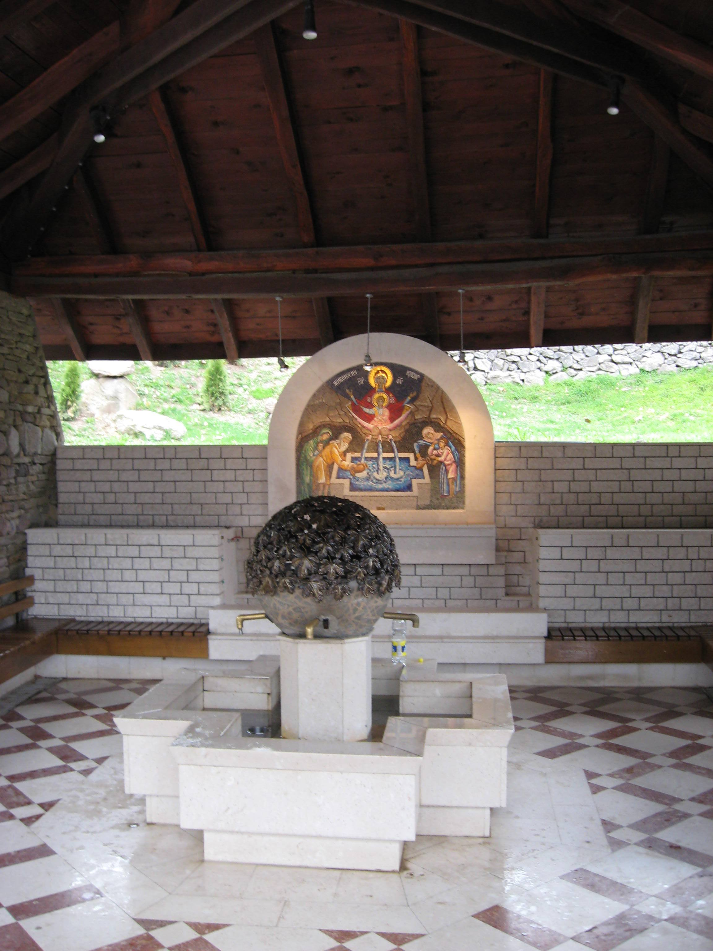 Prolom Spa, near Kuršumlija, Serbia/Source thermale à Prolom Banja, près de Kuršumlija, Serbie